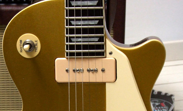 P90 monté sur une guitare de type Les Paul (micro Tonerider, guitare Agile AL-2000)